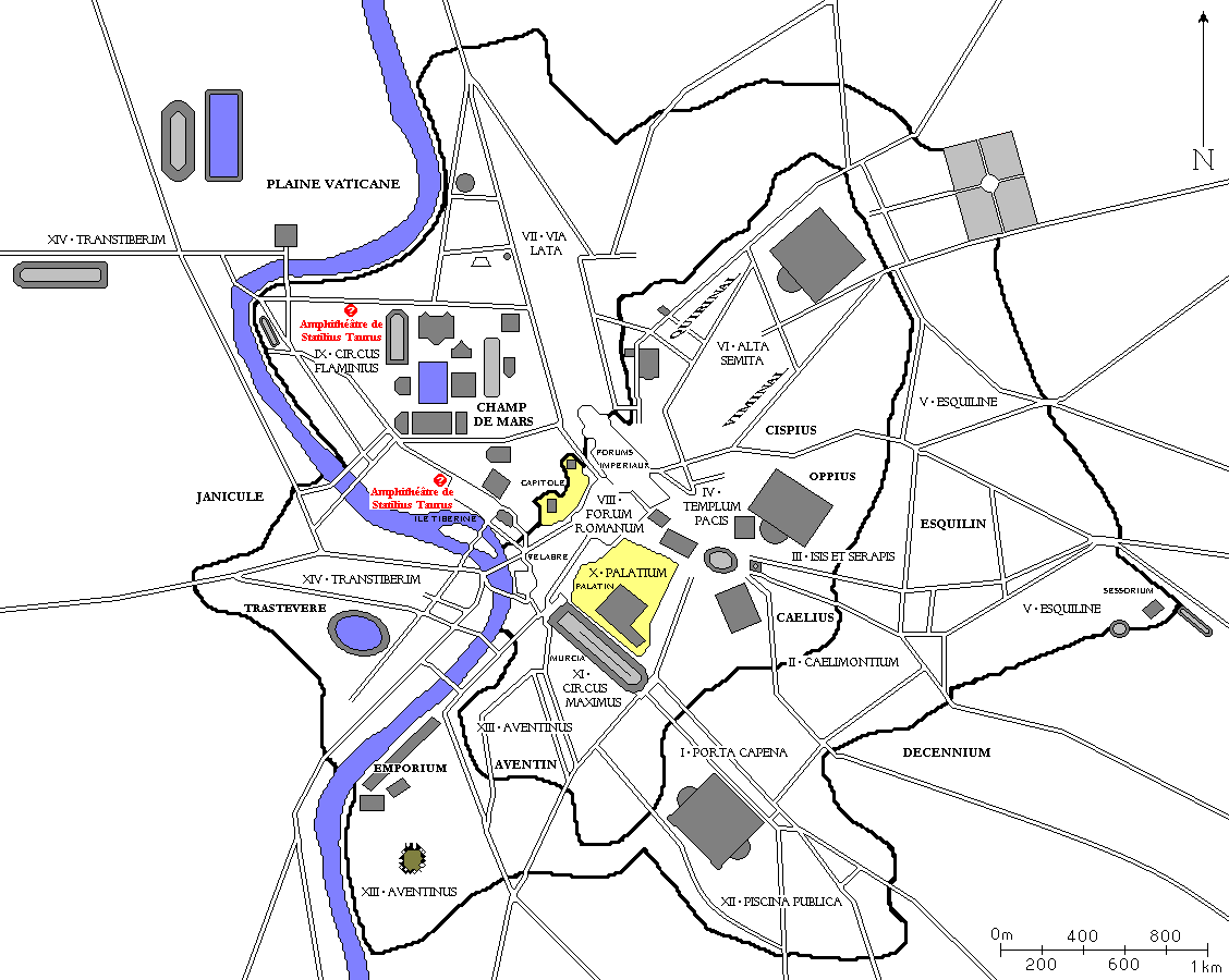 Plan de Rome redessiné à partir de diverses sources. Tous les bâtiments importants construits jusqu'à la fin de l'Empire romain sont dessinés, ainsi que les régions d'Auguste et les collines de Rome. Auteur : ColdEel En rouge, l'amphithéâtre de Statilius Taurus.